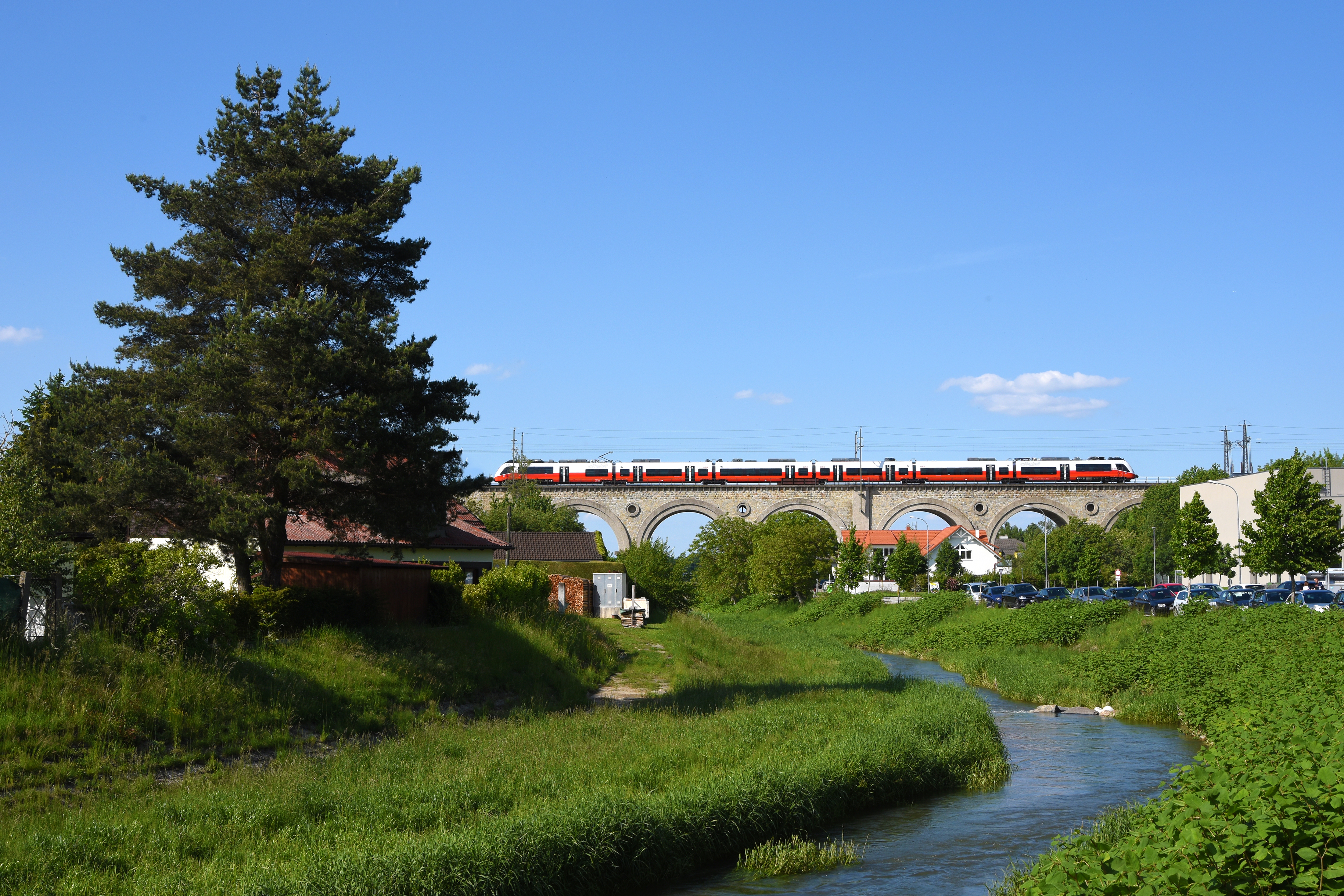 Ein ÖBB 4758-Triebwagen am Viadukt in Neulengbach. Davor der Laabenbach.